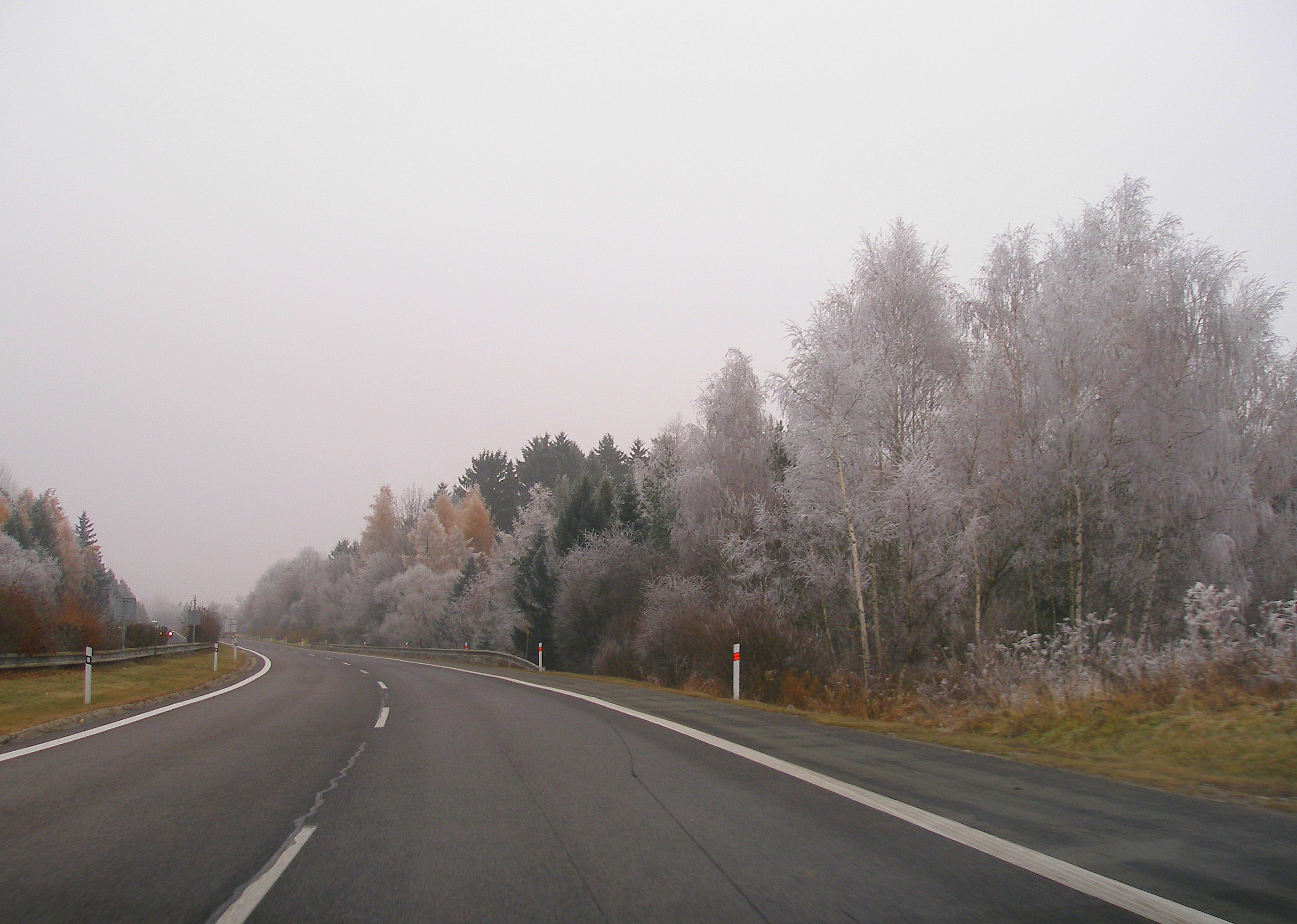 Diaľnica D1. Úsek: Žilina - Liptovský Mikuláš. Slovensko